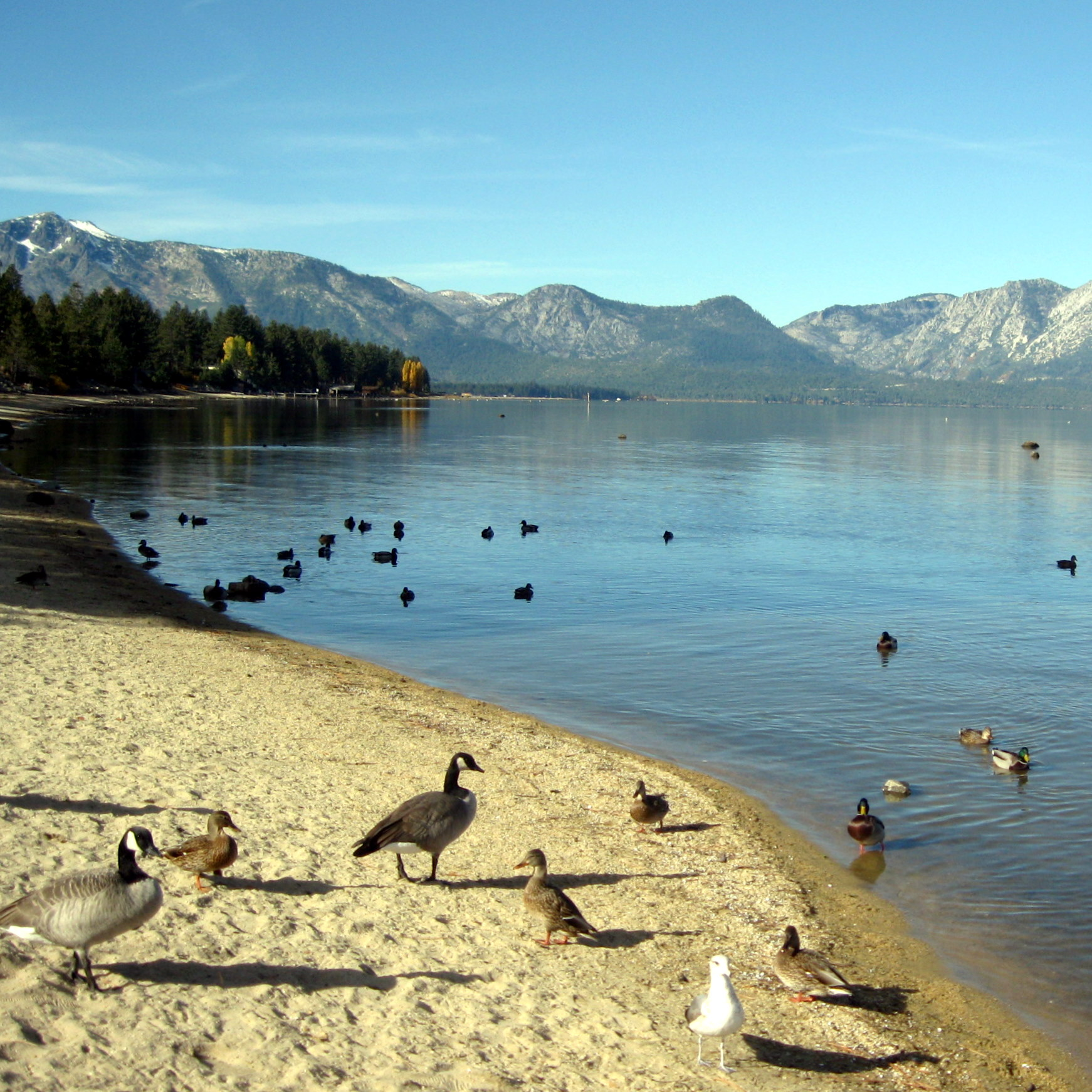 Lake Tahoe